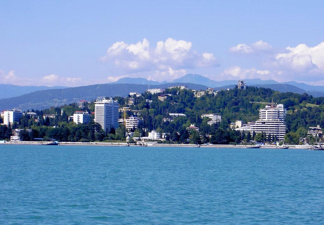 Blick uf Sotschi am Schwarzen Meer in dr subtropische Hertlaubwaldzone.